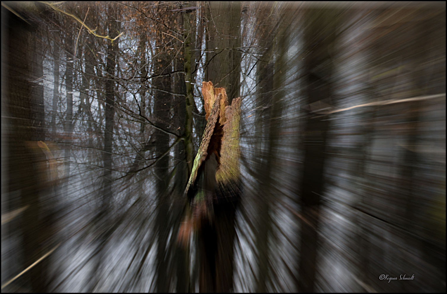 Impressionistische Fotografie Charakteristisch ist für solche Fotos, dass sie aufgrund der Unschärfe sowie ihrer Grobheit durchaus an die Malerei erinnern. Die Momentaufnahme, die der Malerei zu Eigen ist, lässt sich auch hier ausmachen, wobei viele Fotografien an einen zufälligen Schnappschuss erinnern.